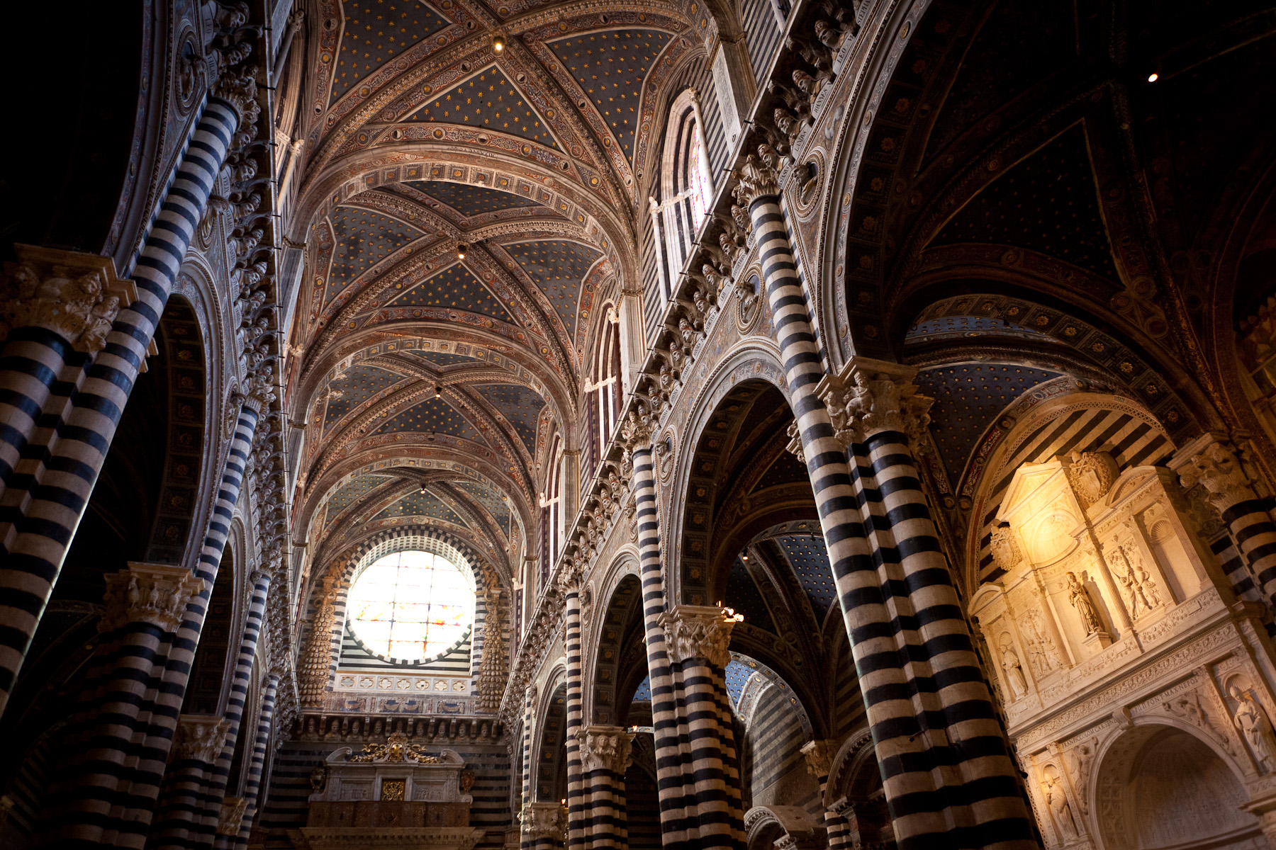 Sienna